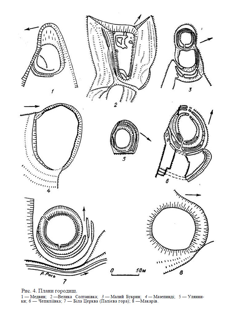 Плани городищ